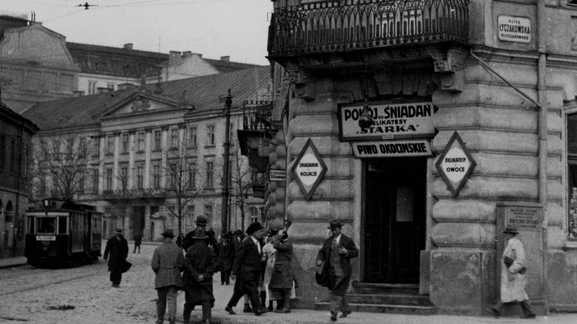 редакція газети Ратуша